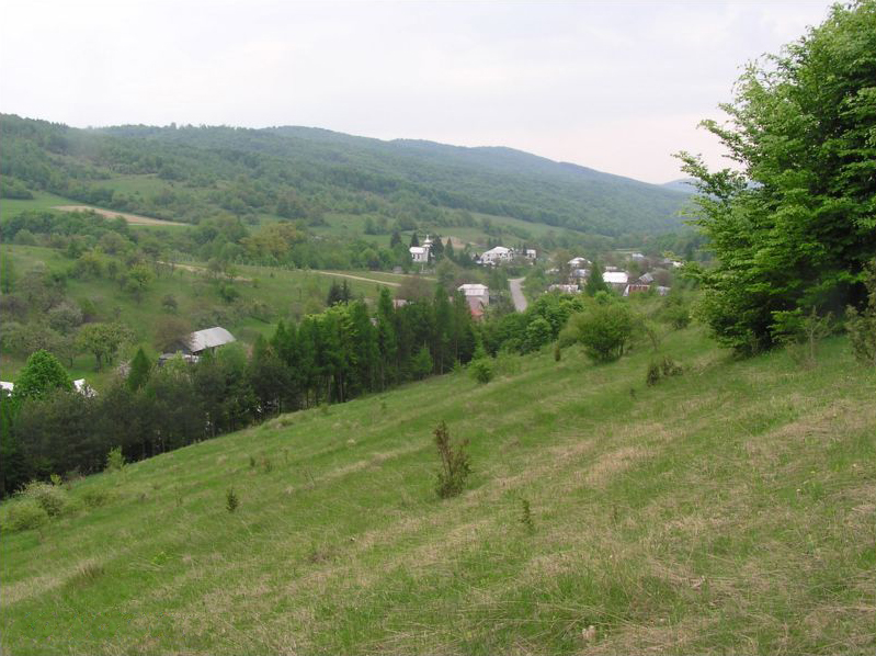 Celkový pohľad